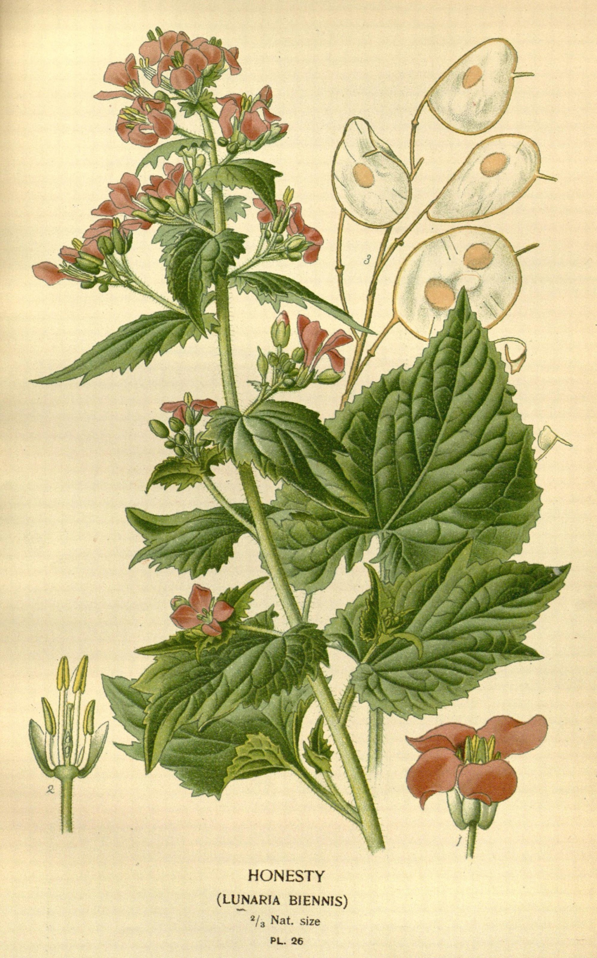 w HONESTY (LUNARIA BIENNIS)